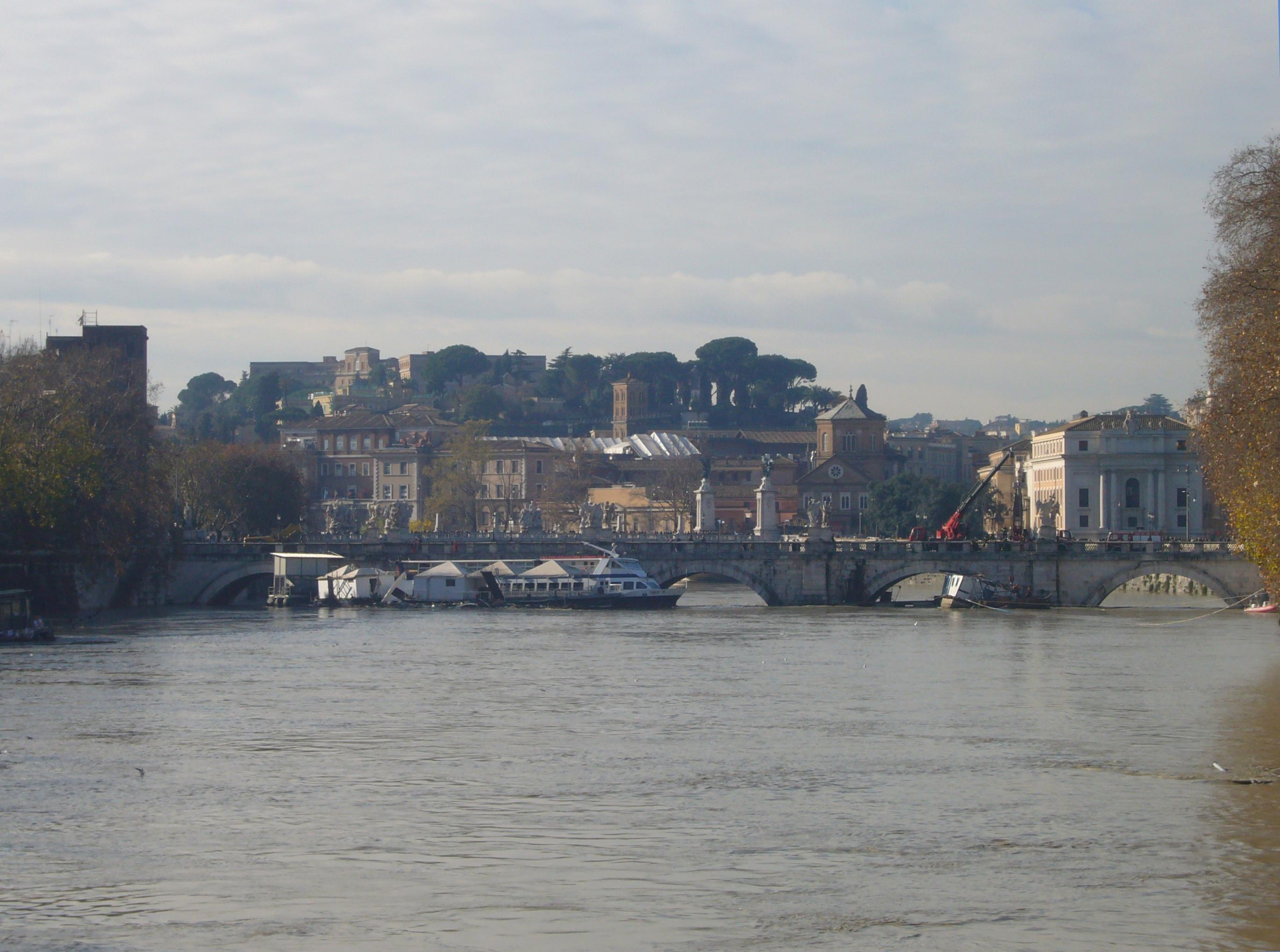 Roma, Ponte Sant'Angelo: i battelli disancorati dalla piena ostruiscono la seconda e la quarta arcata del ponte. Lavori in corso (circa ore 12).